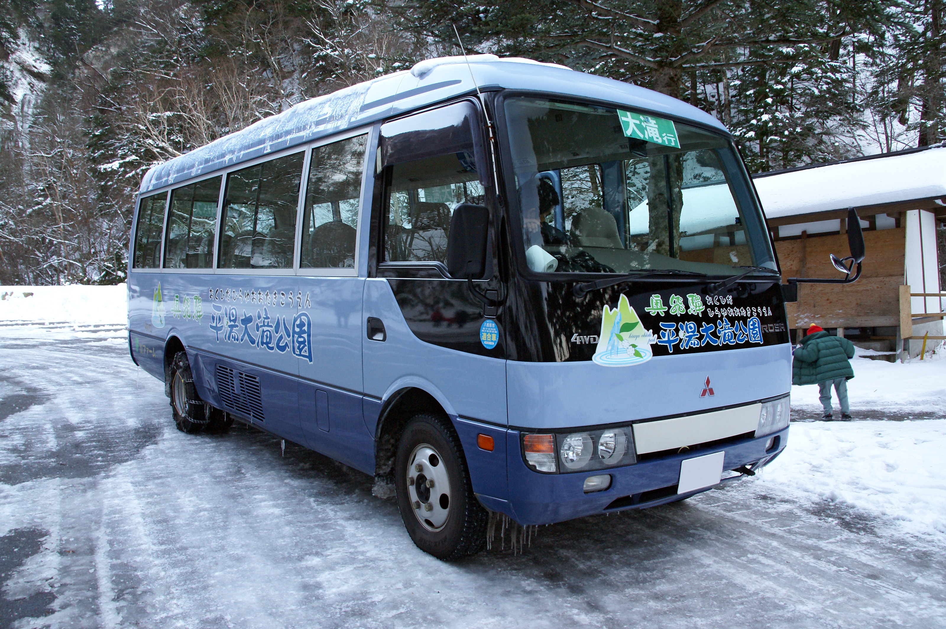 Hirayu-otaki-koen in Takayama, Gifu prefecture, Japan